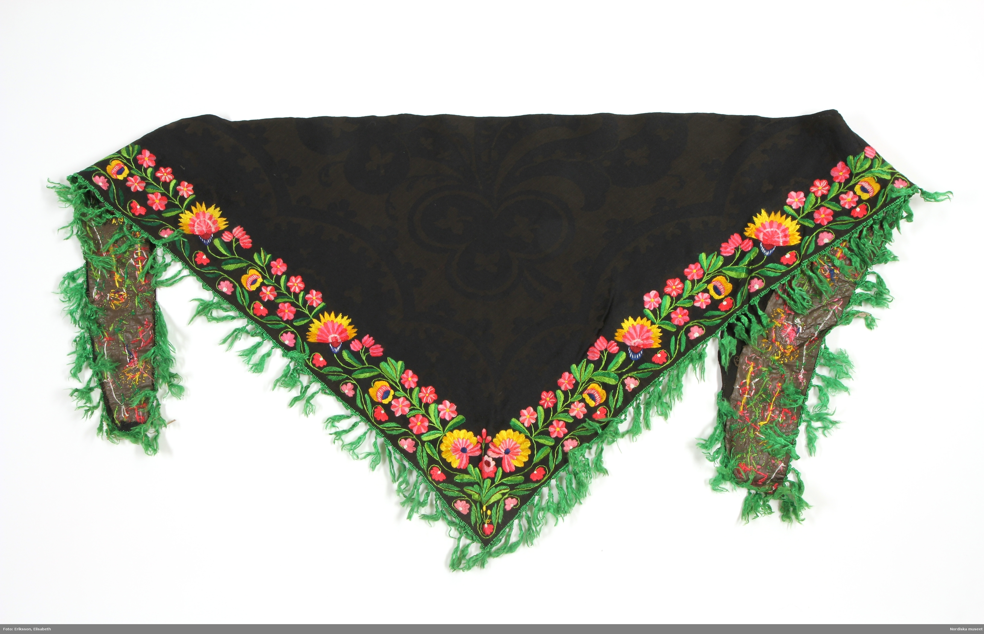 Halskläde